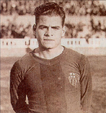 Manuel Parera, jugador del Fútbol Club Barcelona